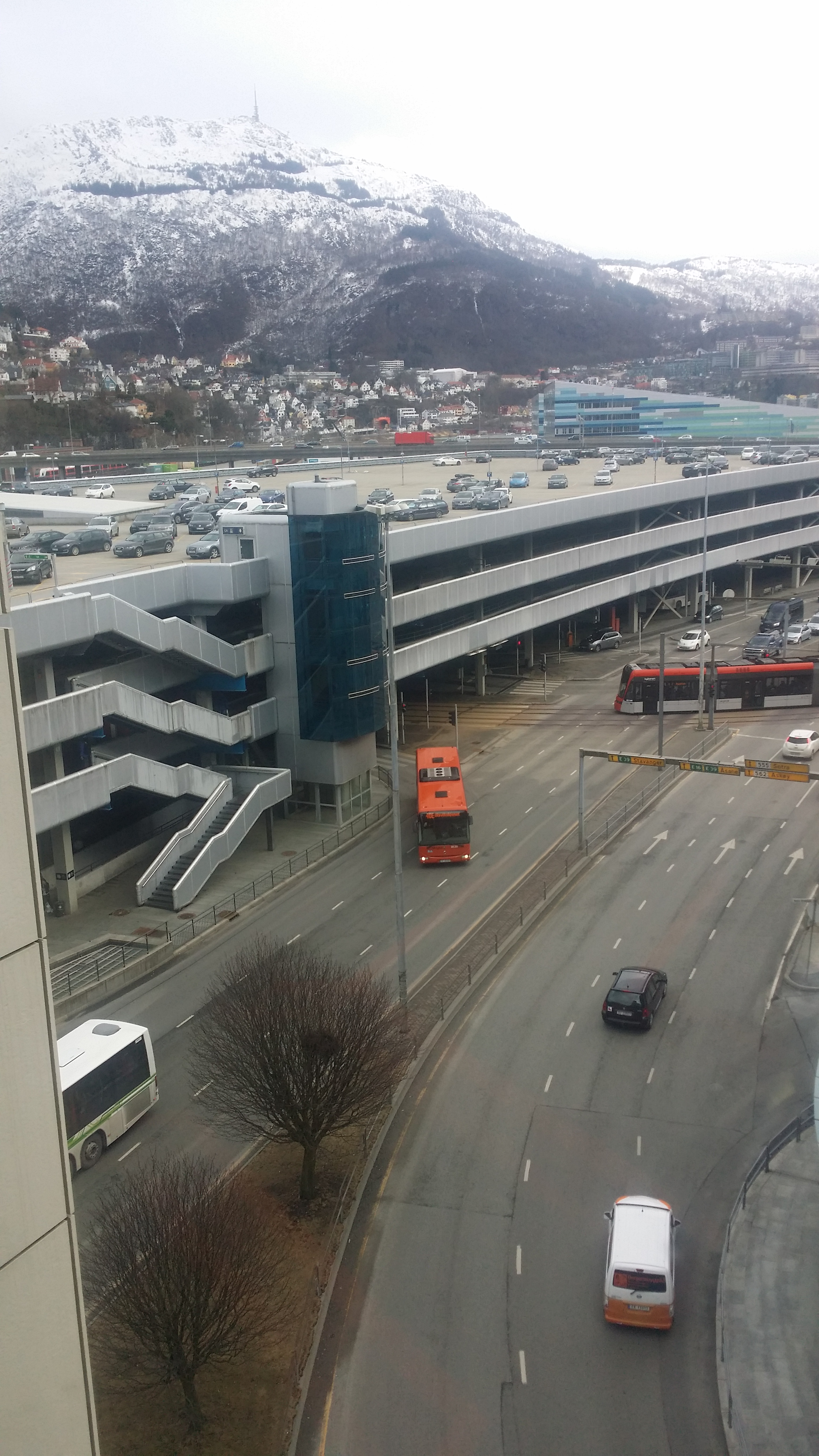 En bybanevogn mot sentrum kjører inn til Bystasjonen.